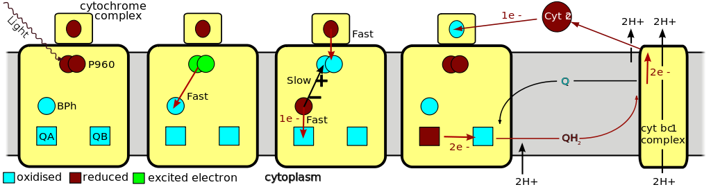 Схема электронного транспорта для пурпурных бактерий